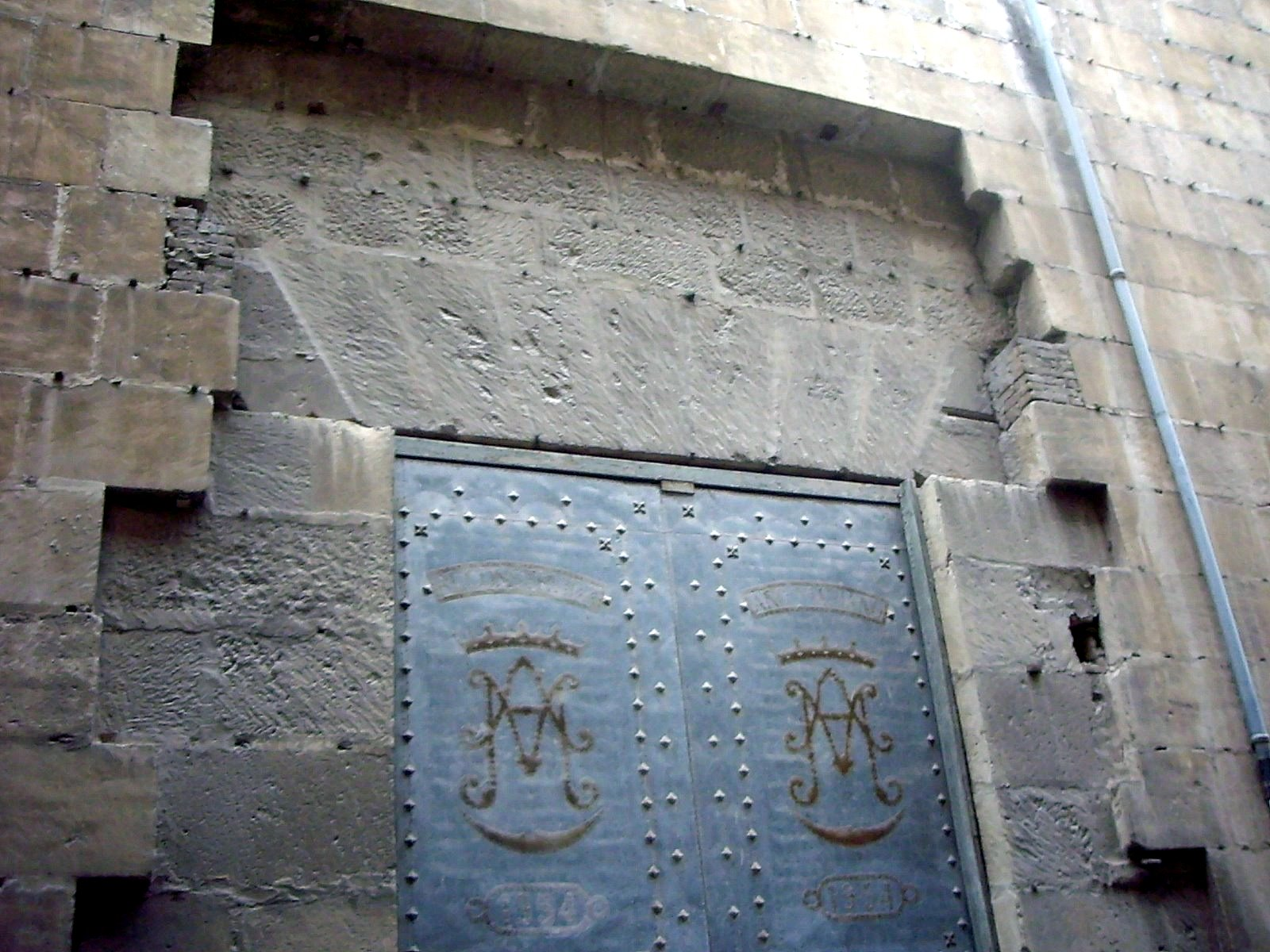 Puerta lateral de Santa María de Alcoi